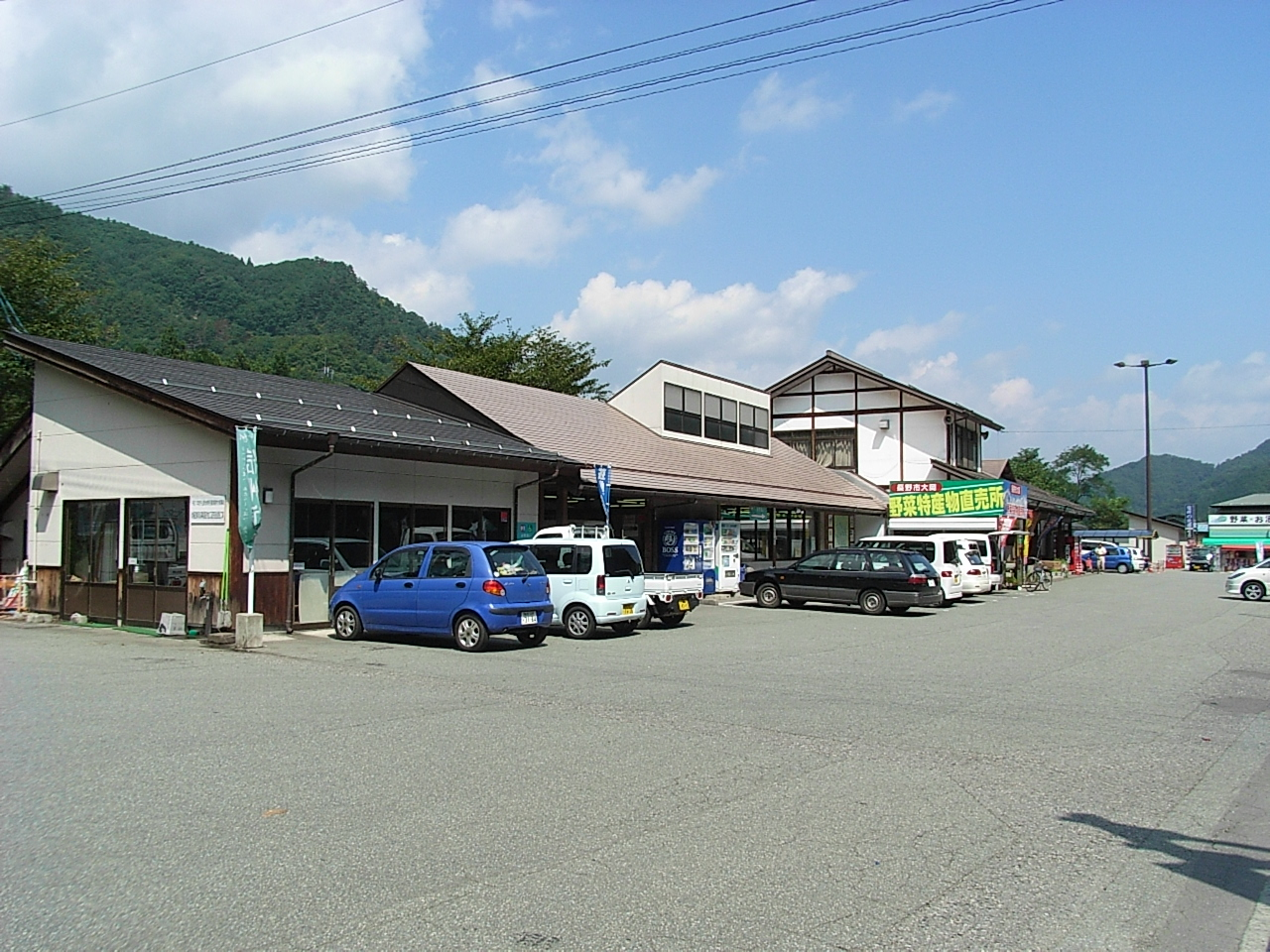 Michinoeki Nagano City Ooka Tokusan Center (Nagano)(道の駅長野市大岡特産センター)